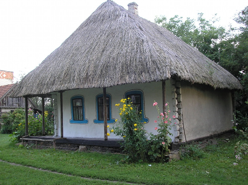 Villages Prelesne. Ukraine.